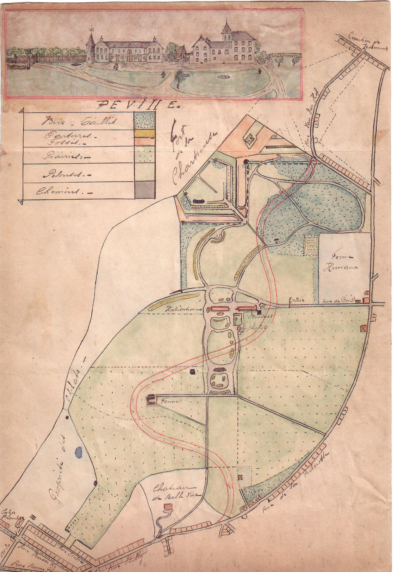 Château dit de Péville, à Grivegnée (Liège). Cette propriété, qui appartenait avant 1914 à Jean-François Jowa, comportait un morceau du fort hollandais de la Chartreuse (en haut et à gauche). La propriété a depuis été lotie. Elle bordait aussi le bois des Oblats.